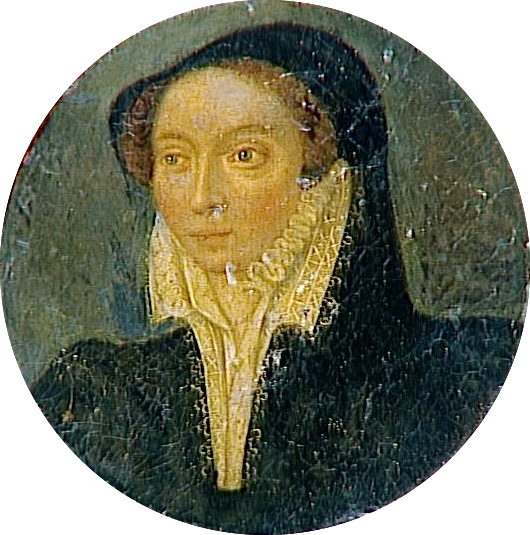 Madame Gaudin, dame de la Bourdaisière